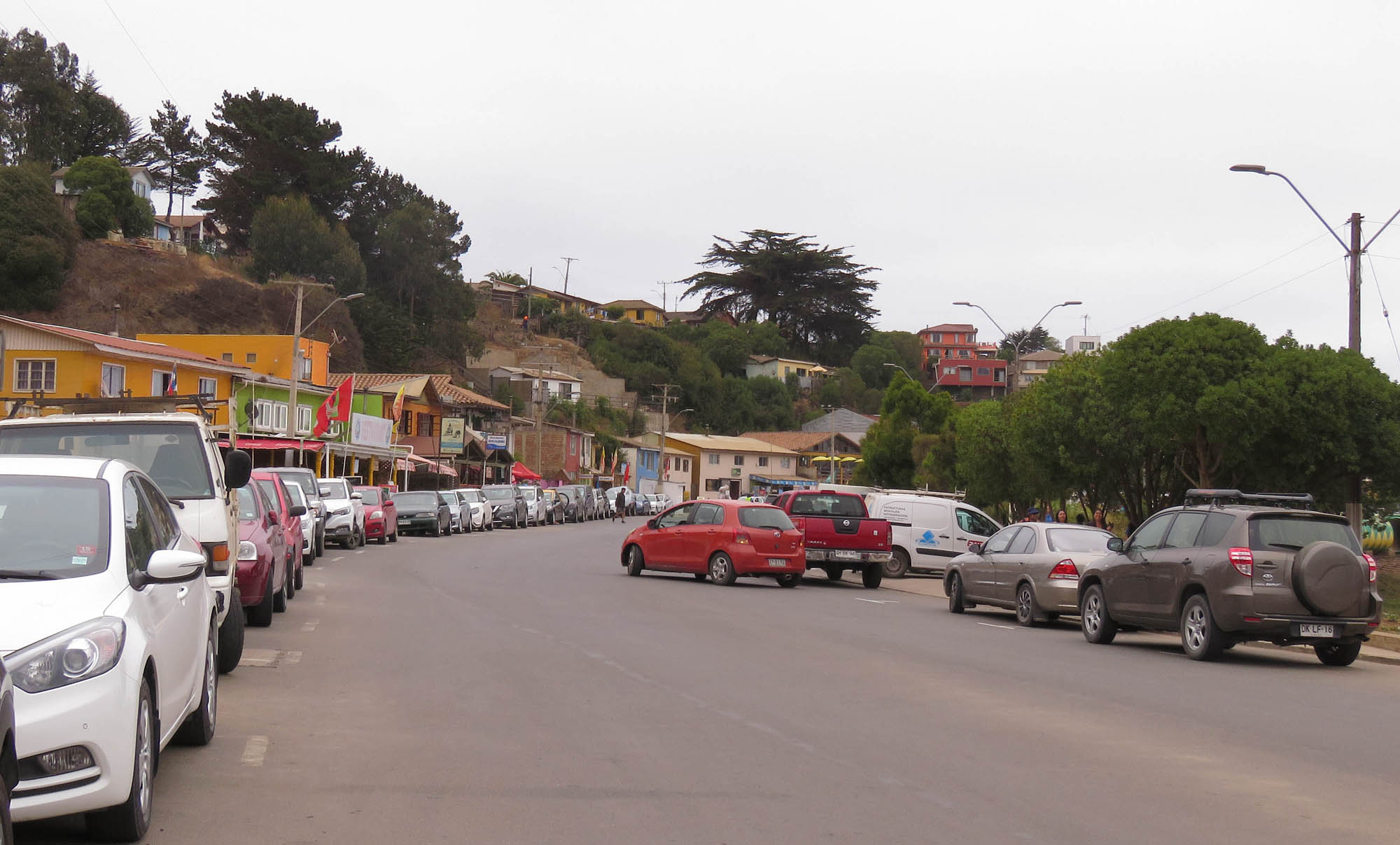 Calle principal de Bucalemu, Sexta región